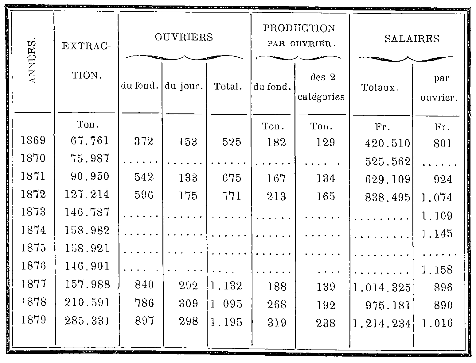 Ouvriers, rendements et salaires de la Compagnie des mines de Liévin de 1869 à 1879.